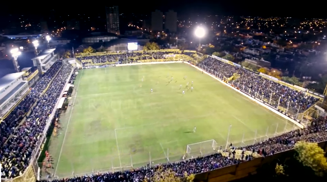 Estadio Roberto Natalio Carminatti Club Olimpo